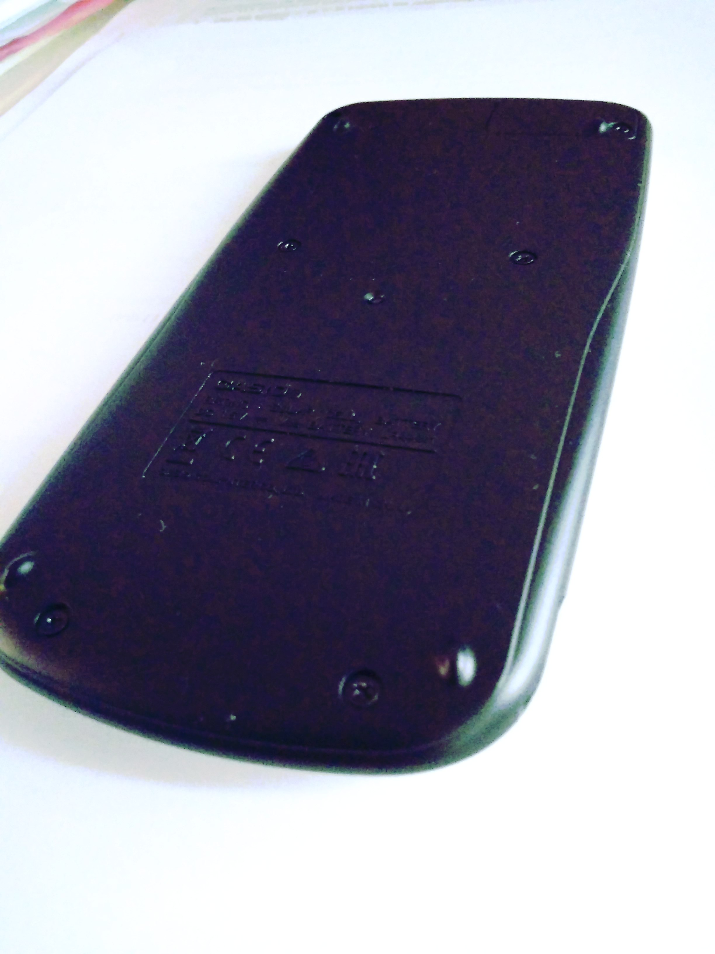 背